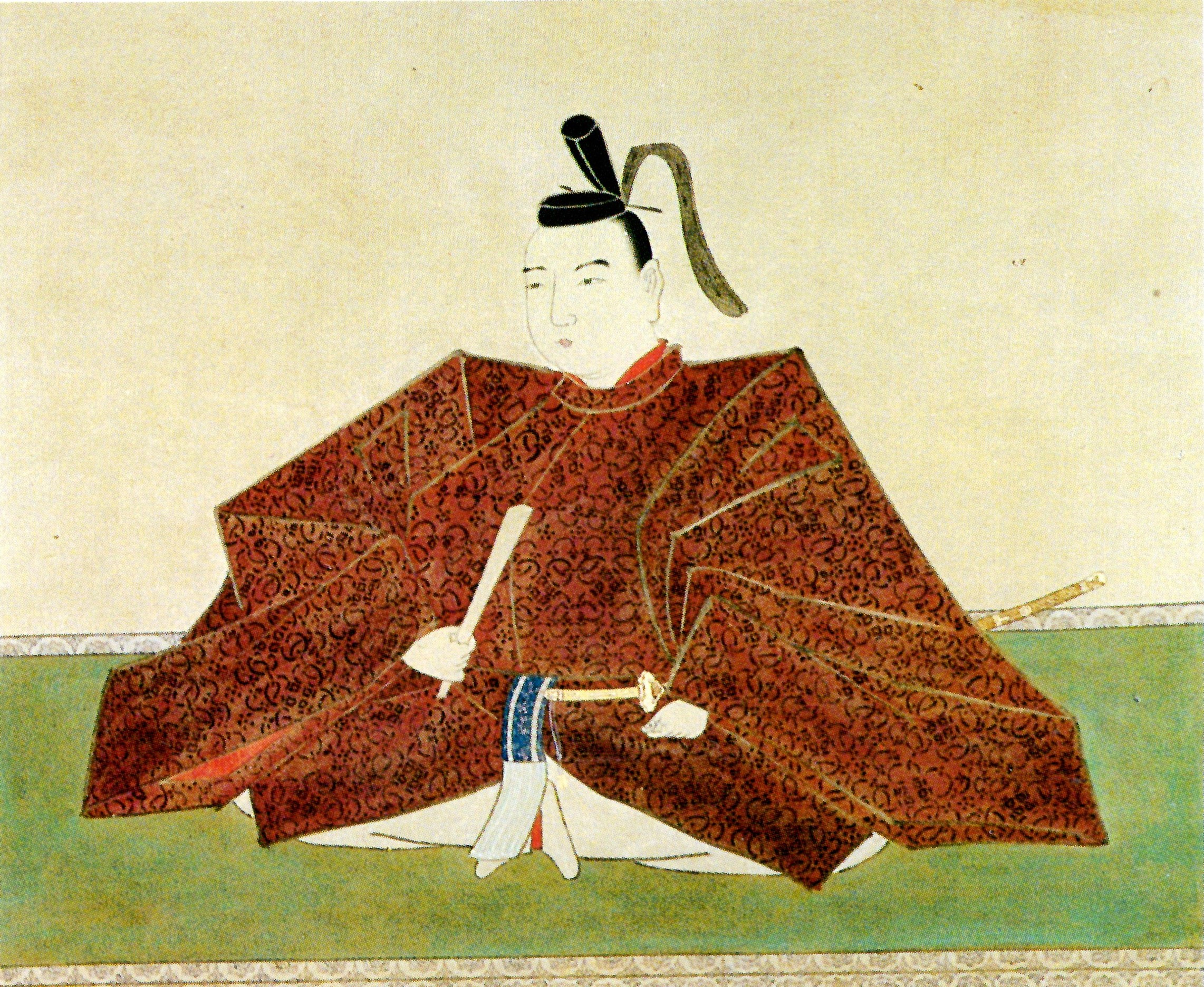 金森頼業の肖像。